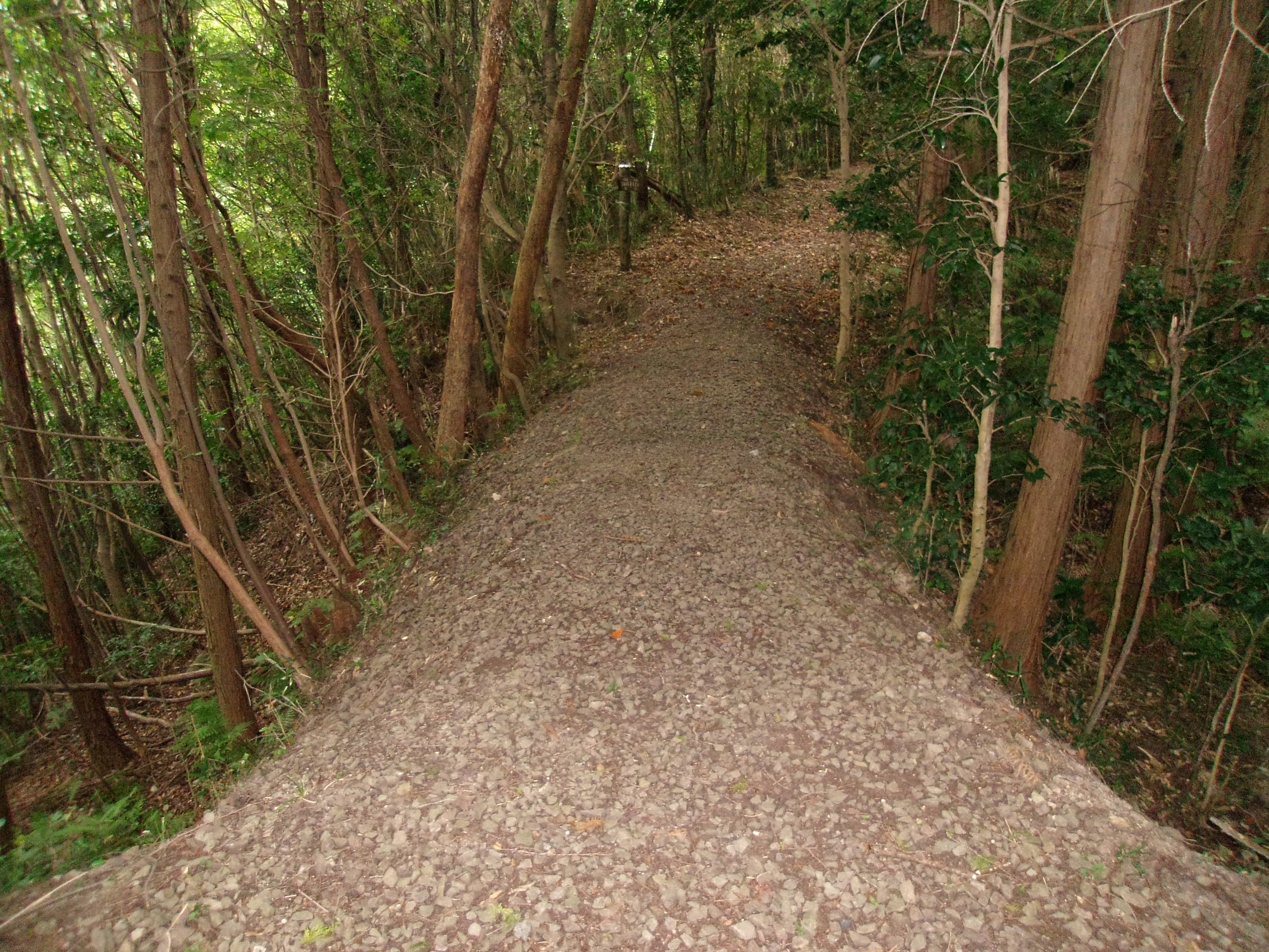 世界遺産「石見銀山」の構成資産である銀山街道温泉津沖泊道 小谷を埋めて道を整備した土橋